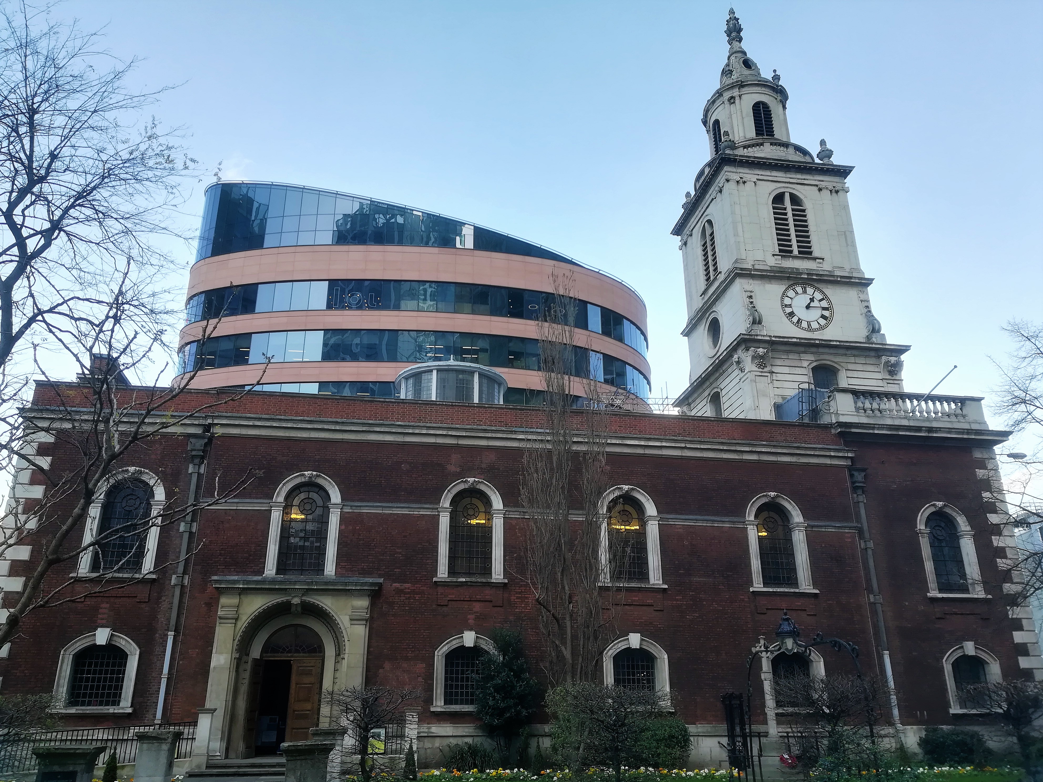 Kościół St Botolph-without-Bishopsgate w Londynie.